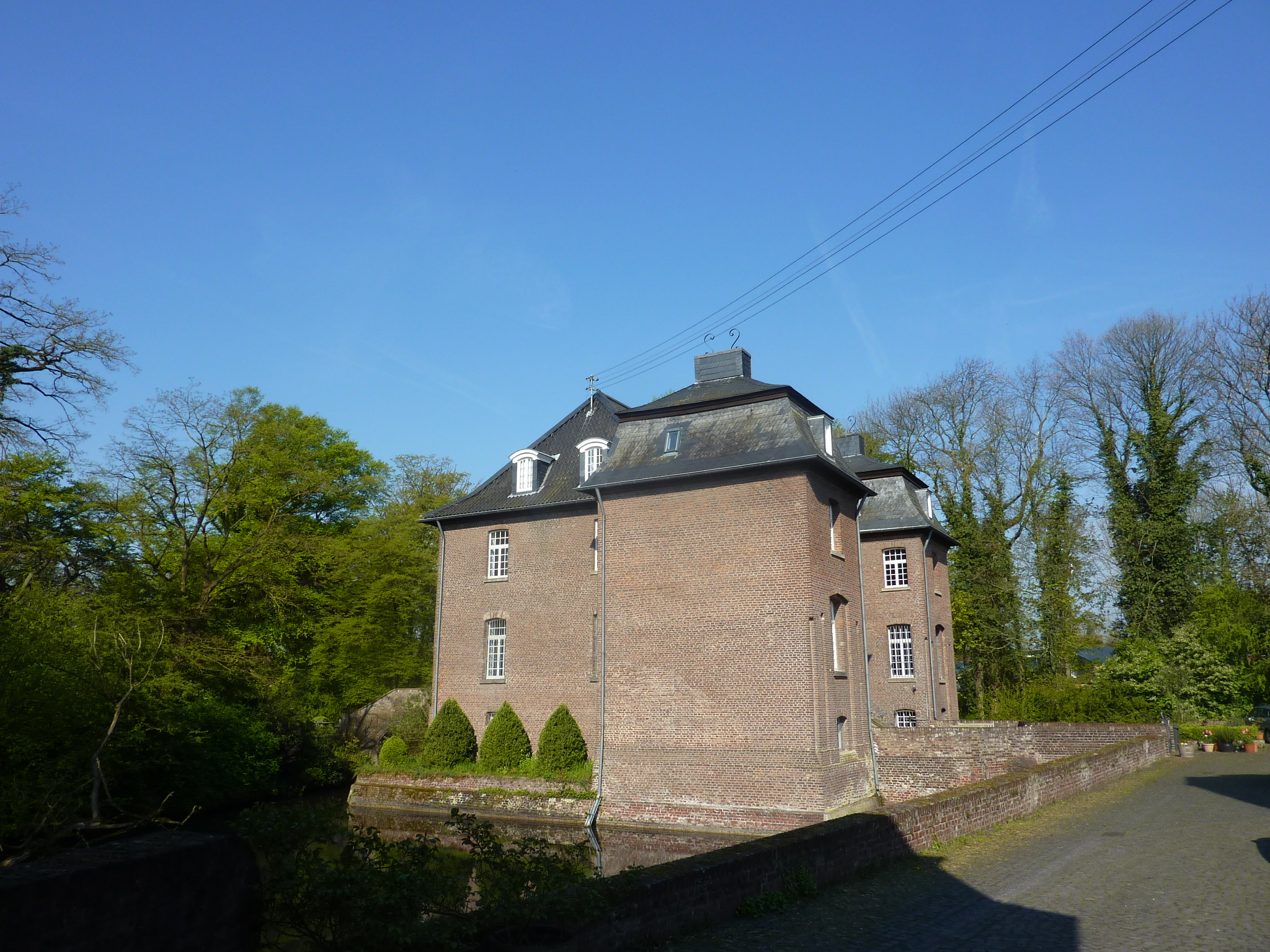 Müggenburg, Neuss-Norf